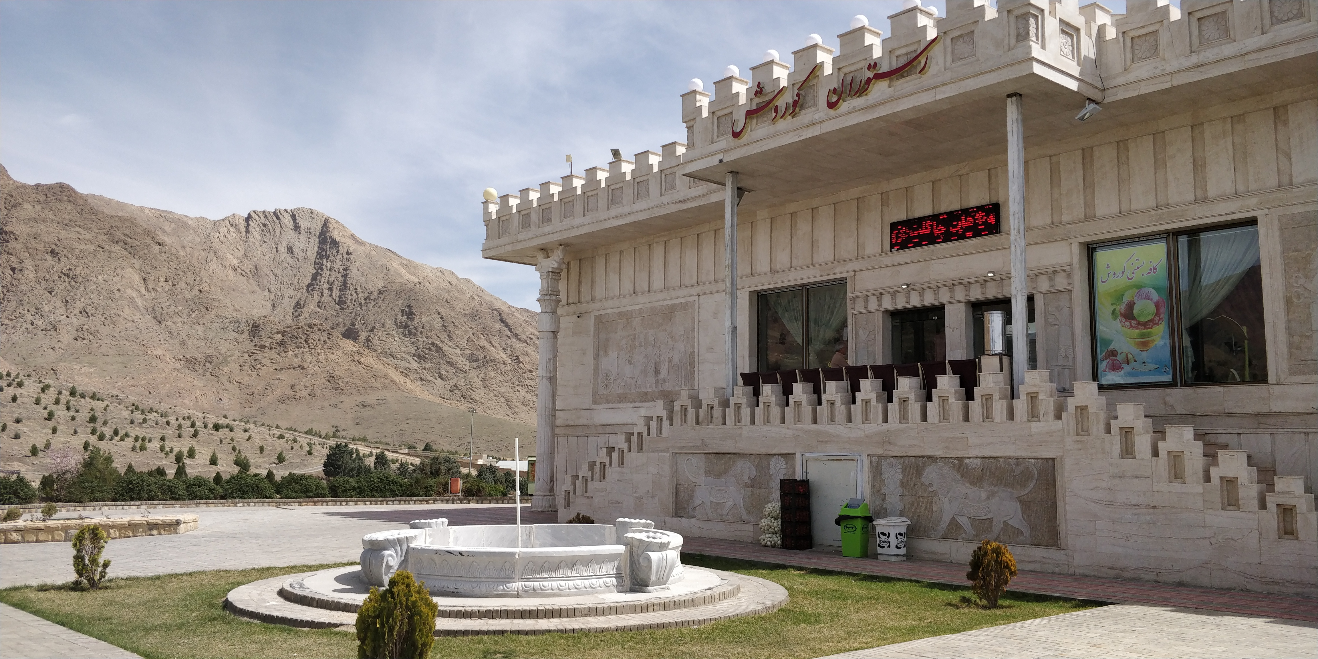 رستورانی با طراحی کاخ‌های هخامنشی در منقطه بام ملایر